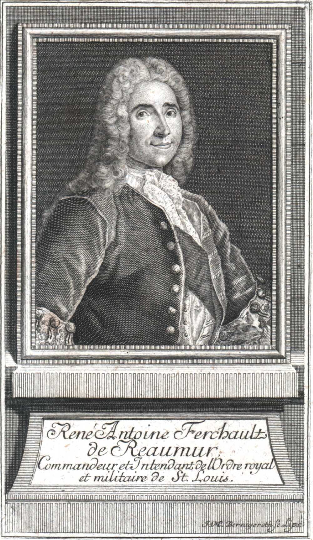 René-Antoine Ferchault de Réaumur (1683-1757)